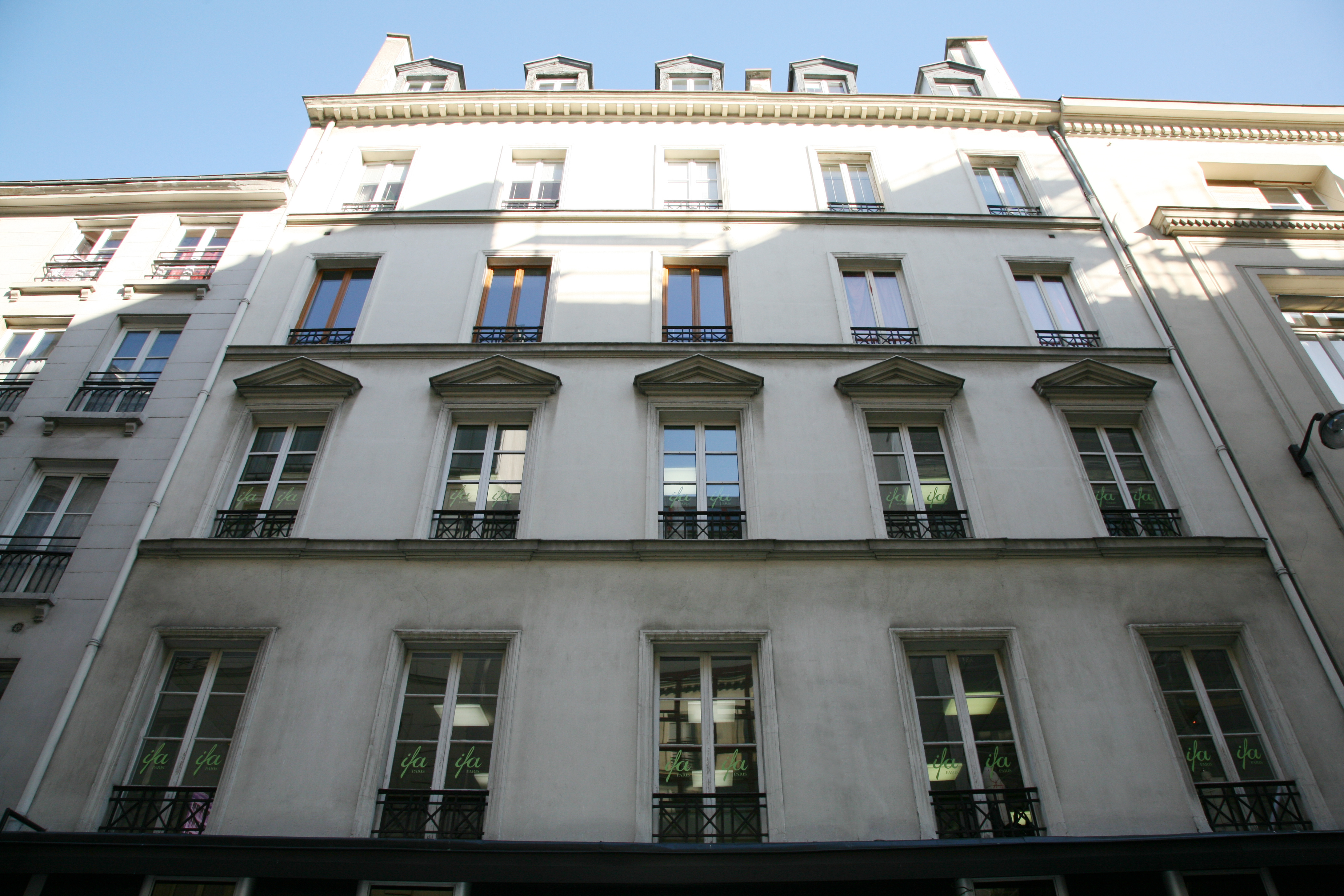 IFA Paris Fashion School in France